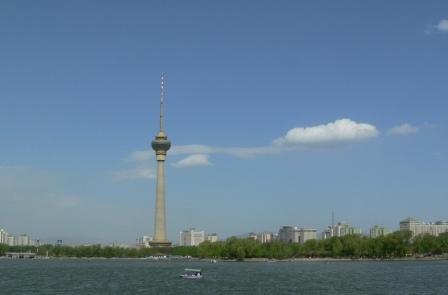 中央广播电视塔 拍摄